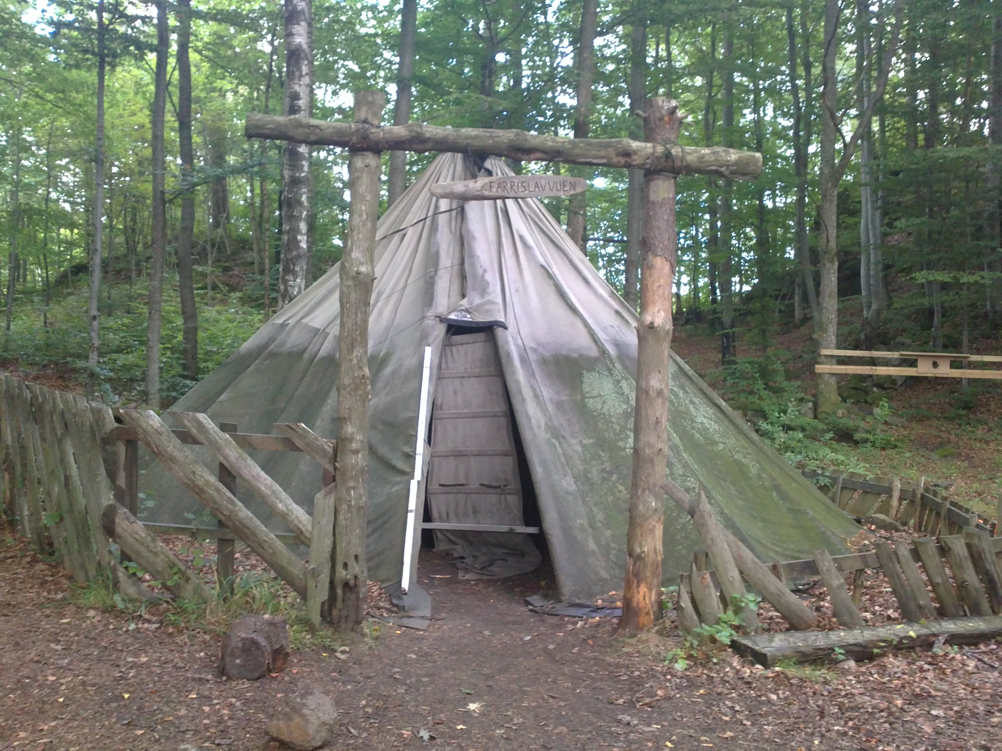 Bilde av lavvo ved Farris Naturskole, Larvik